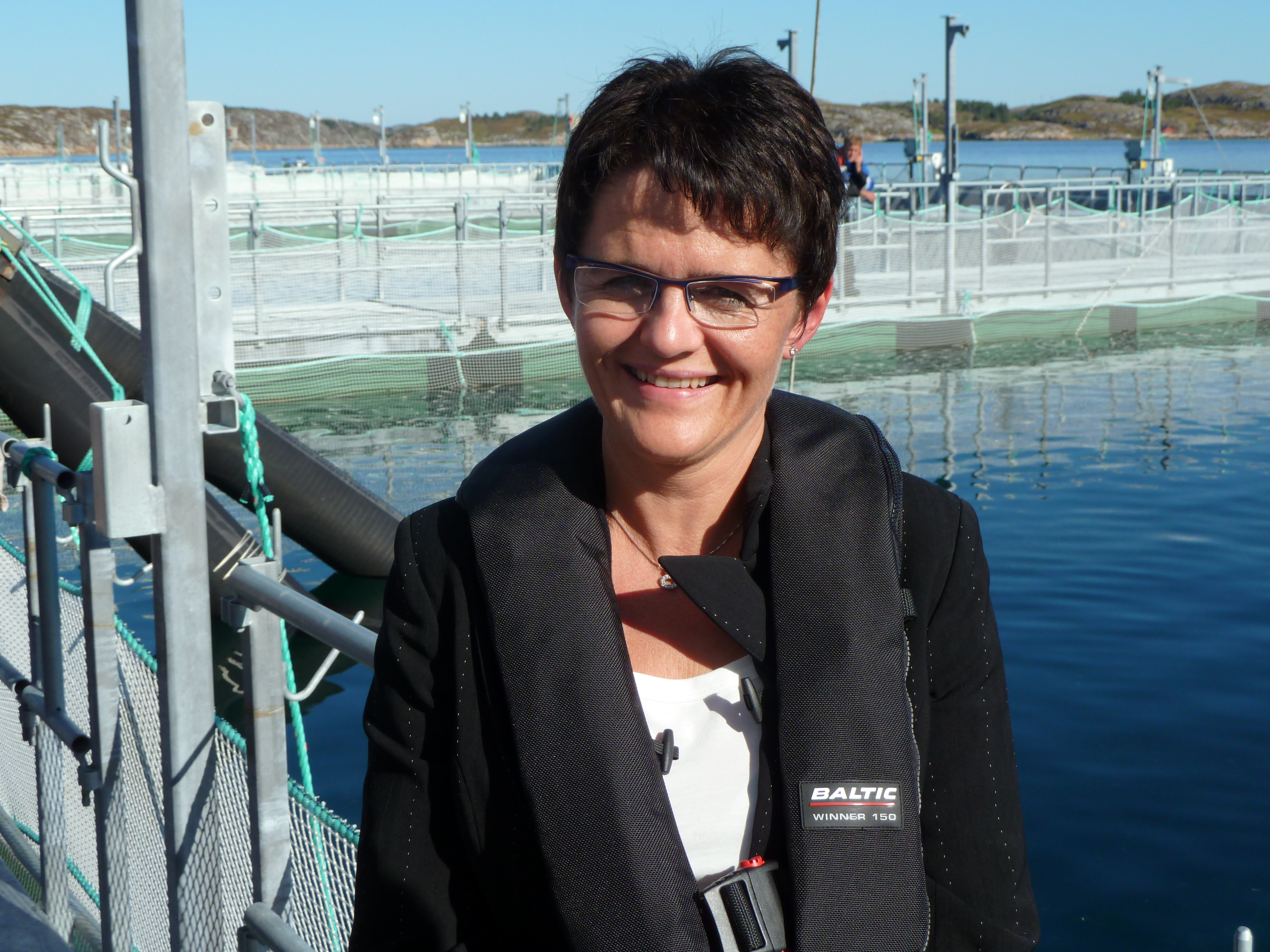 Fiskeri- og kystminister Lisbeth Berg-Hansen ved nyannlegget InnovaMar da hun sammen med statsminister Jens Stoltenberg, kunnskapsminister Kristin Halvorsen og kommunal- og regionalminister Liv Signe Navarsete besøkte SalMar på Frøya 8. sept. 2010.